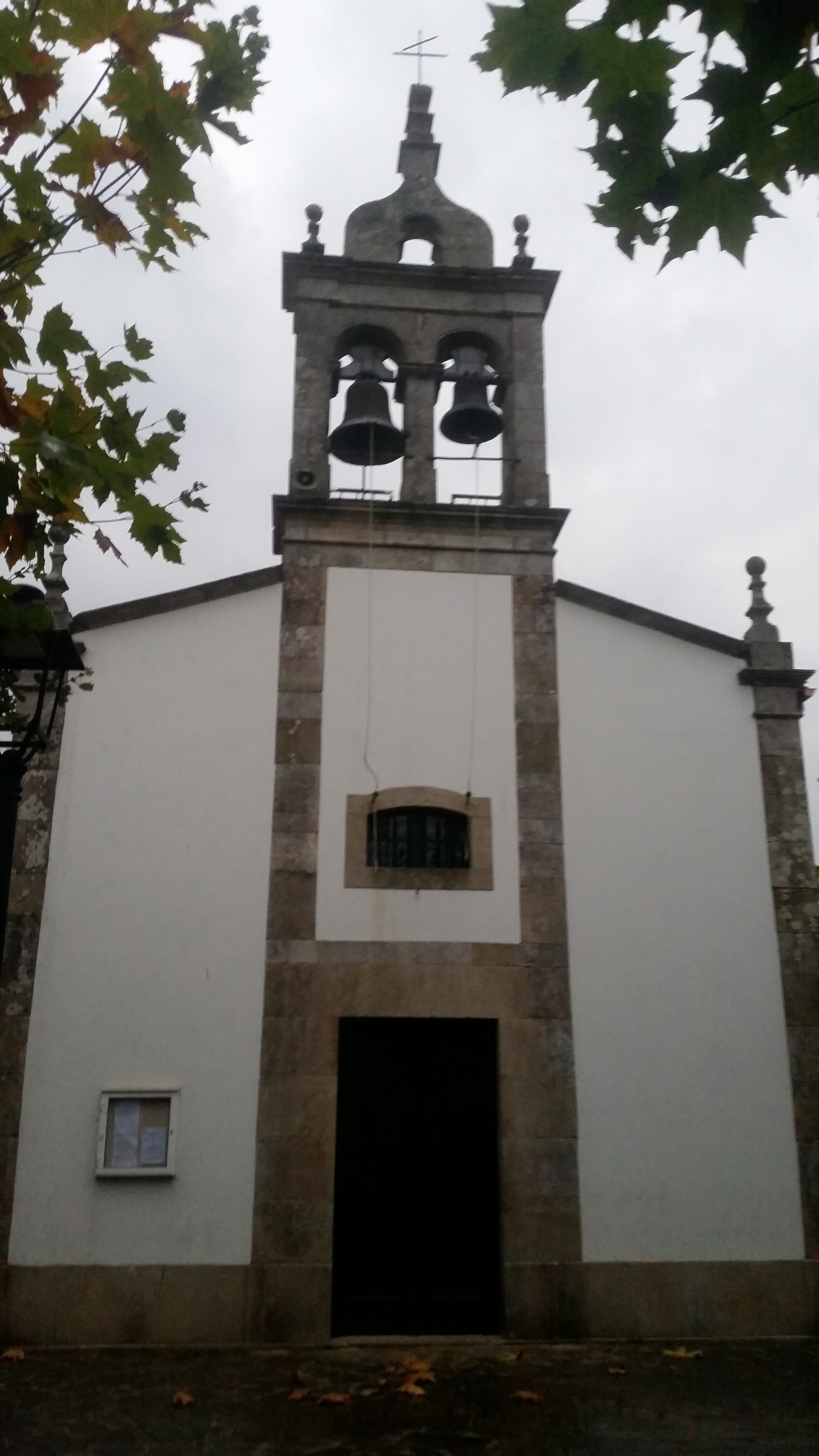 Iglesia de Bértoa